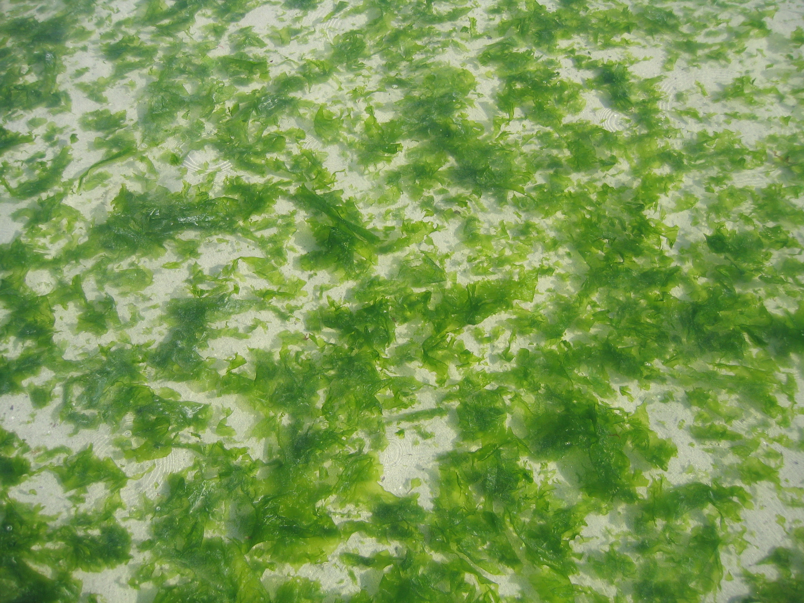 Concentration d'algues connue sous le terme de marée verte